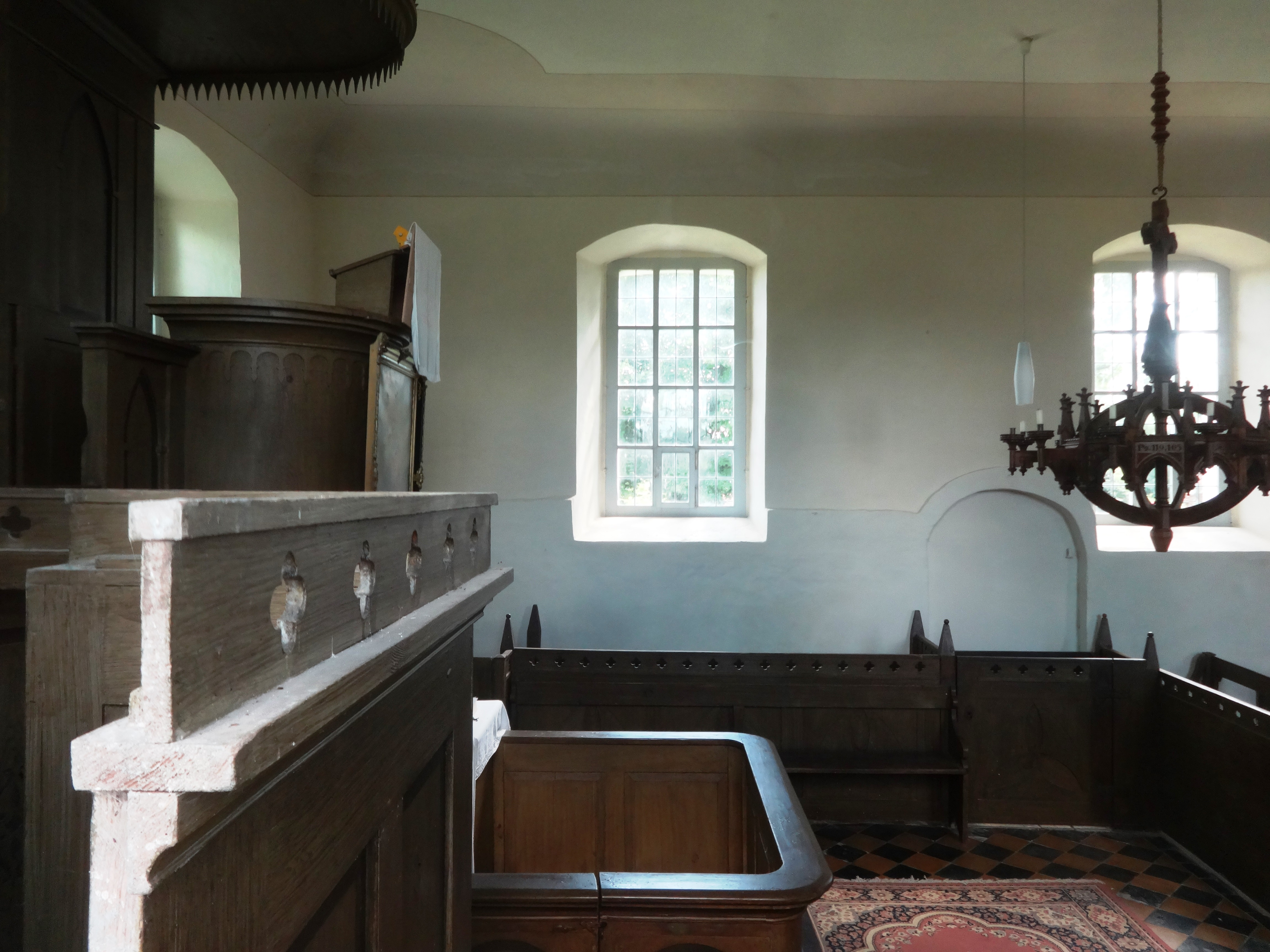 Die Kirche in Bugewitz ist ein Sakralbau aus dem 15. Jahrhundert in Vorpommern. Im Innenraum steht unter anderem eine Grünberg-Orgel aus dem Jahr 1886.